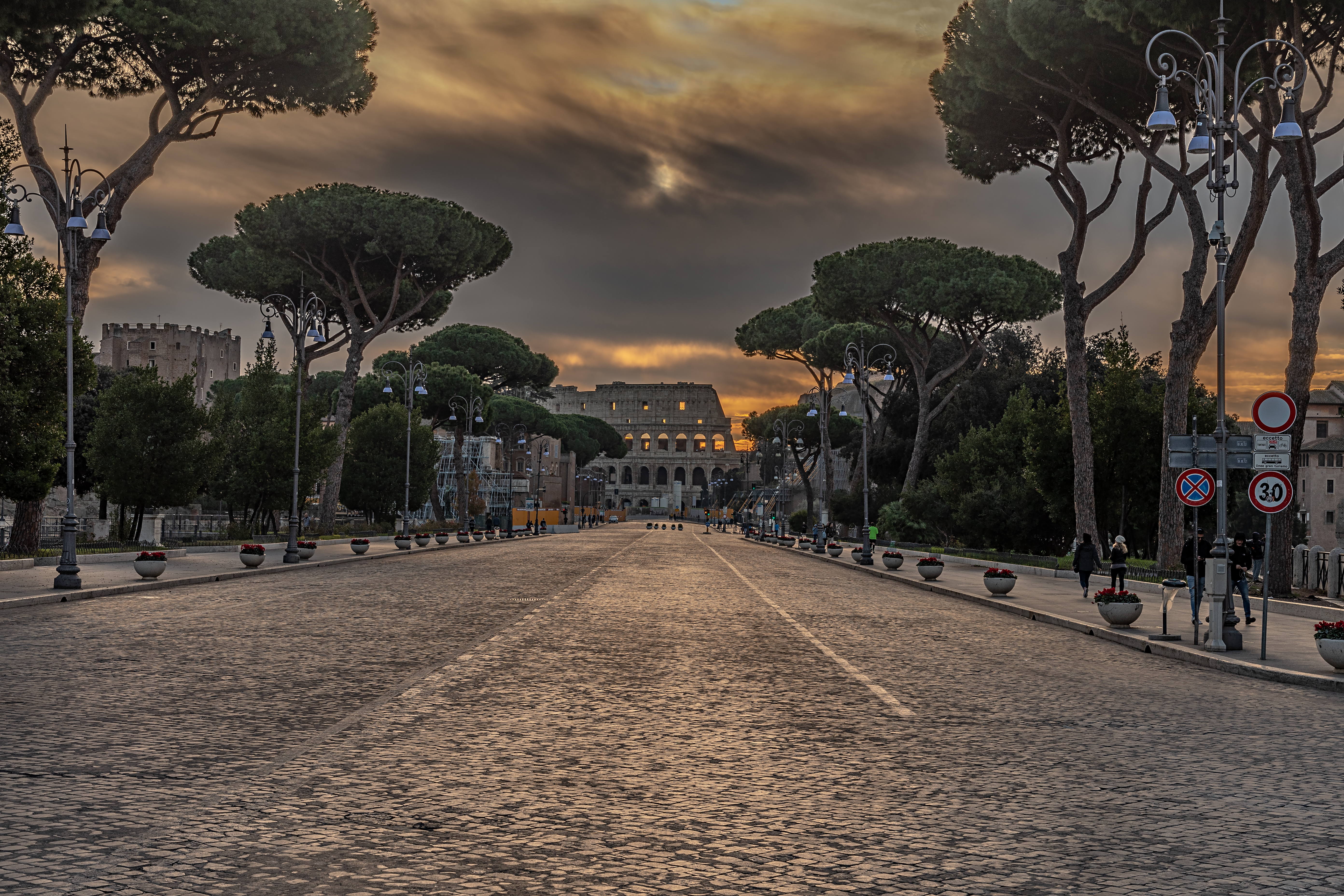 Die Via dei Fori Imperiali in Richtung zum Kolosseum